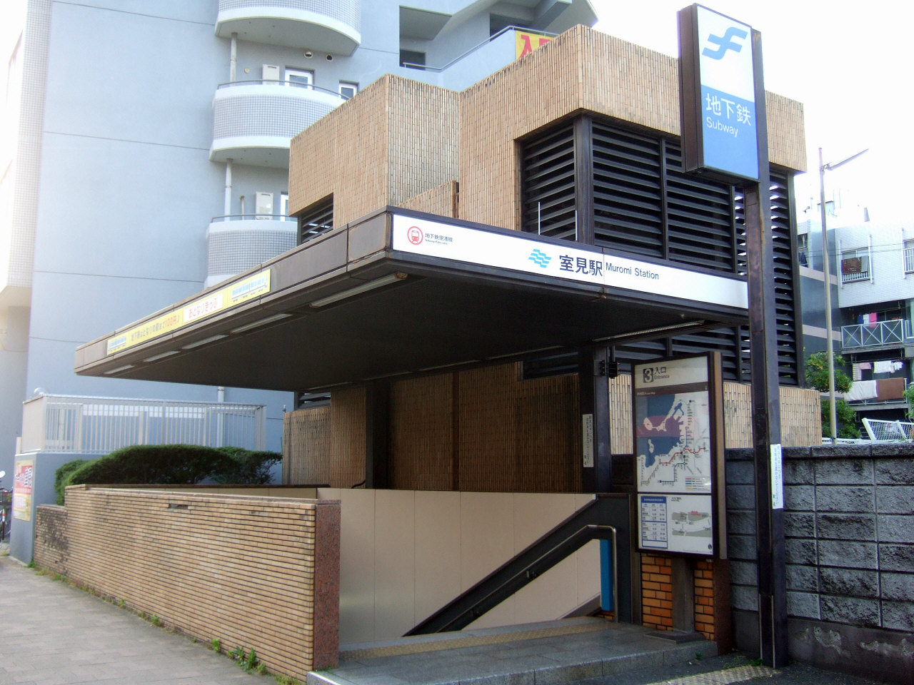 福岡市地下鉄室見駅（Muromi Station,Fukuoka City Subway）